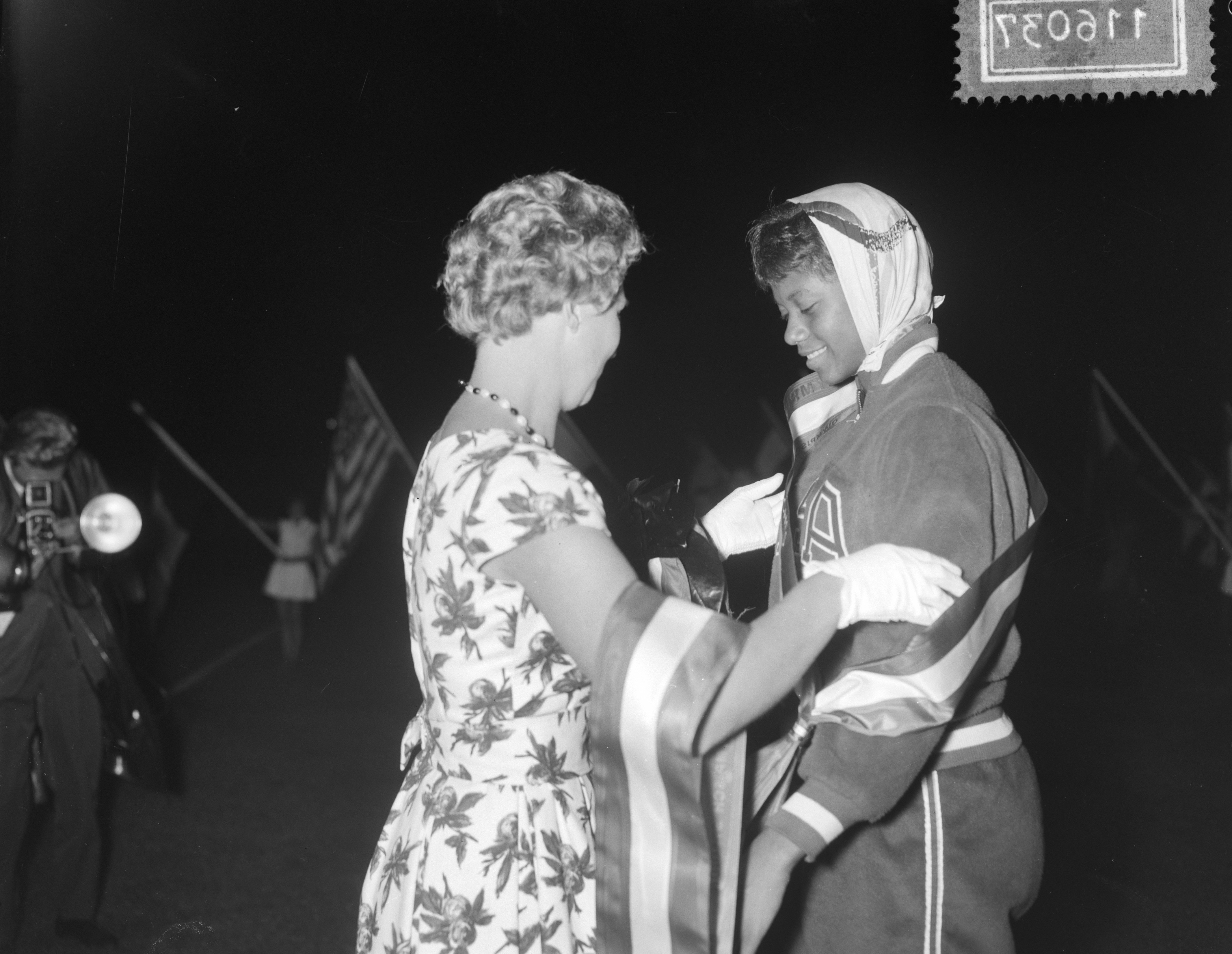 Collectie / Archief : Fotocollectie Anefo Reportage / Serie : [ onbekend ] Beschrijving : Olympische revances in stadion Amsterdam, Wilma Rudolph Datum : 15 september 1960 Locatie : Amsterdam, Noord-Holland Trefwoorden : atletiek Persoonsnaam : Wilma Rudolph Fotograaf : Bilsen, Joop van / Anefo Auteursrechthebbende : Nationaal Archief Materiaalsoort : Negatief (zwart/wit) Nummer archiefinventaris : bekijk toegang 2.24.01.04 Bestanddeelnummer : 911-6037